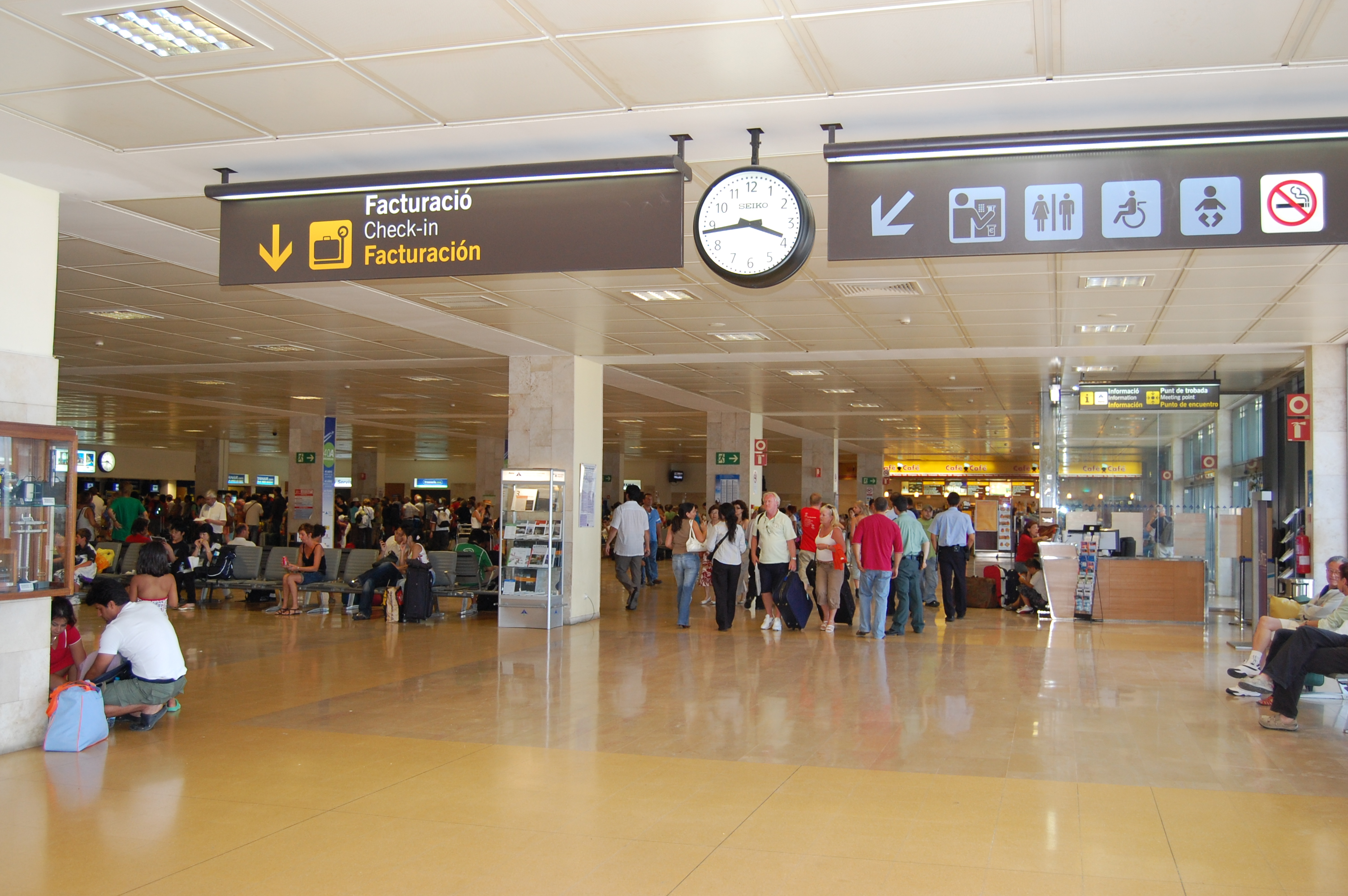 Aeroporto de Girona (Costa Brava), Catalunha, Espanha.